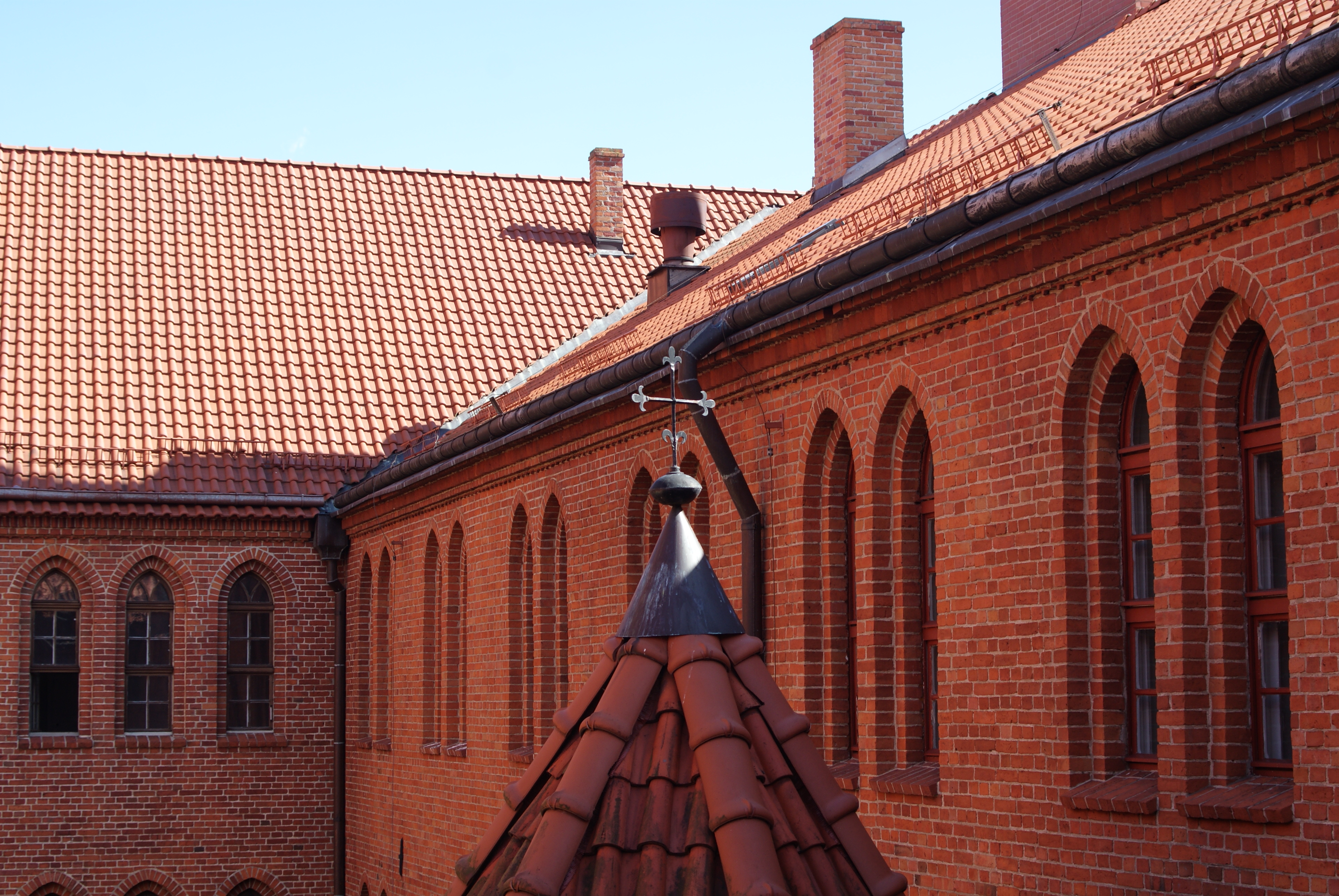 Pelplin, kościół, ob. katedra p.w. NMP, 1280-1350, 1557, 1894-1899